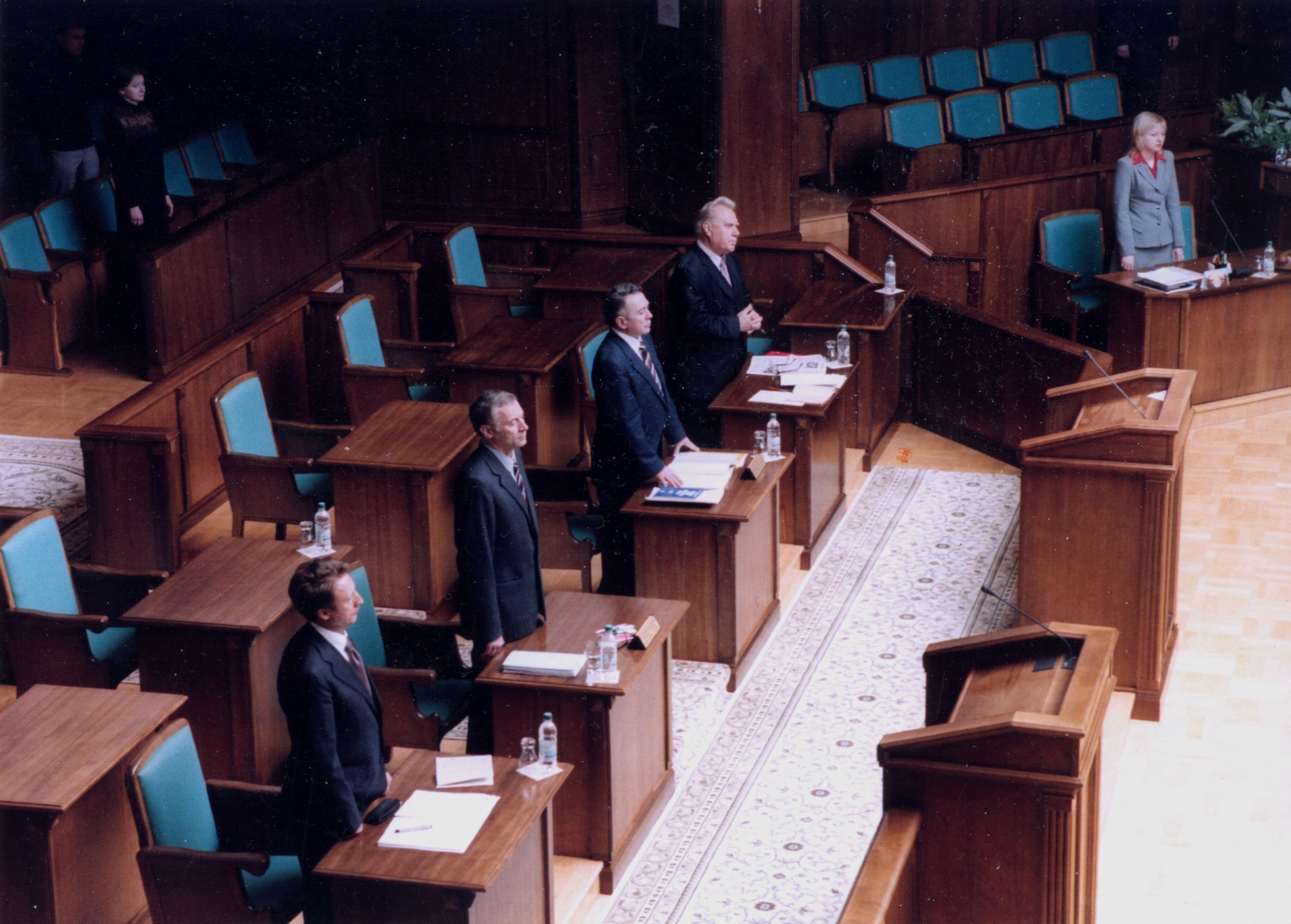 Слухання в Конституційному Суді України щодо законності передачі НАКу "Нафтогаз України" держпакетів акцій товариств "Укртатнафта" та "Галичина". Зліва направо: Голова НАК «Нафтогаз України» Юрій Бойко Постійний представник Президента України в Конституційному Суді України Владислав Носов. Постійний представник Верховної Ради України в Конституційному Суді України Анатолій Селіванов.